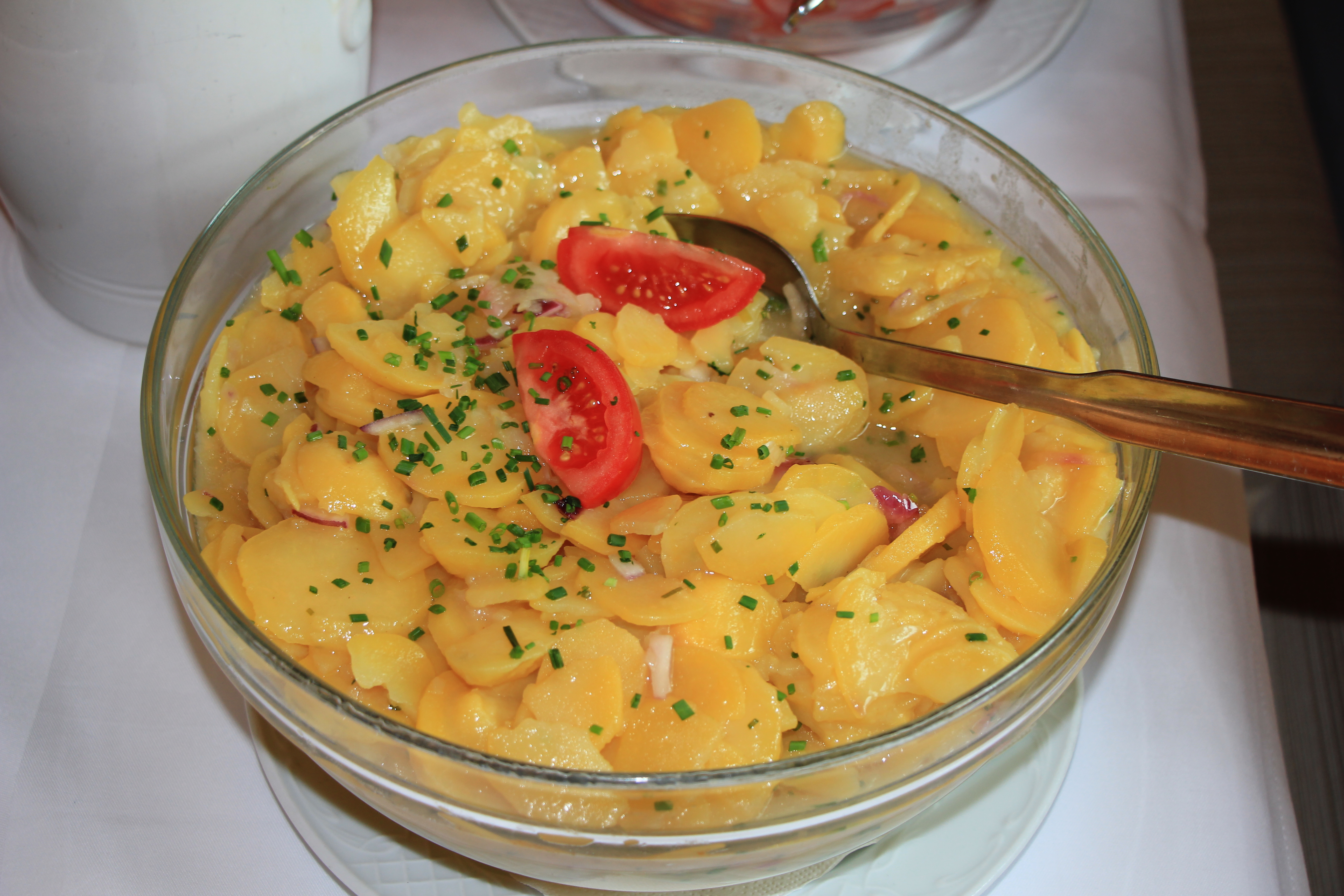 Schüssel mit Kartoffel- oder Erdäpfelsalat, mit Zwiebel, garniert mit Tomate (Paradeiser) und Schnittlauch bei einem Büffet in Niederösterreich